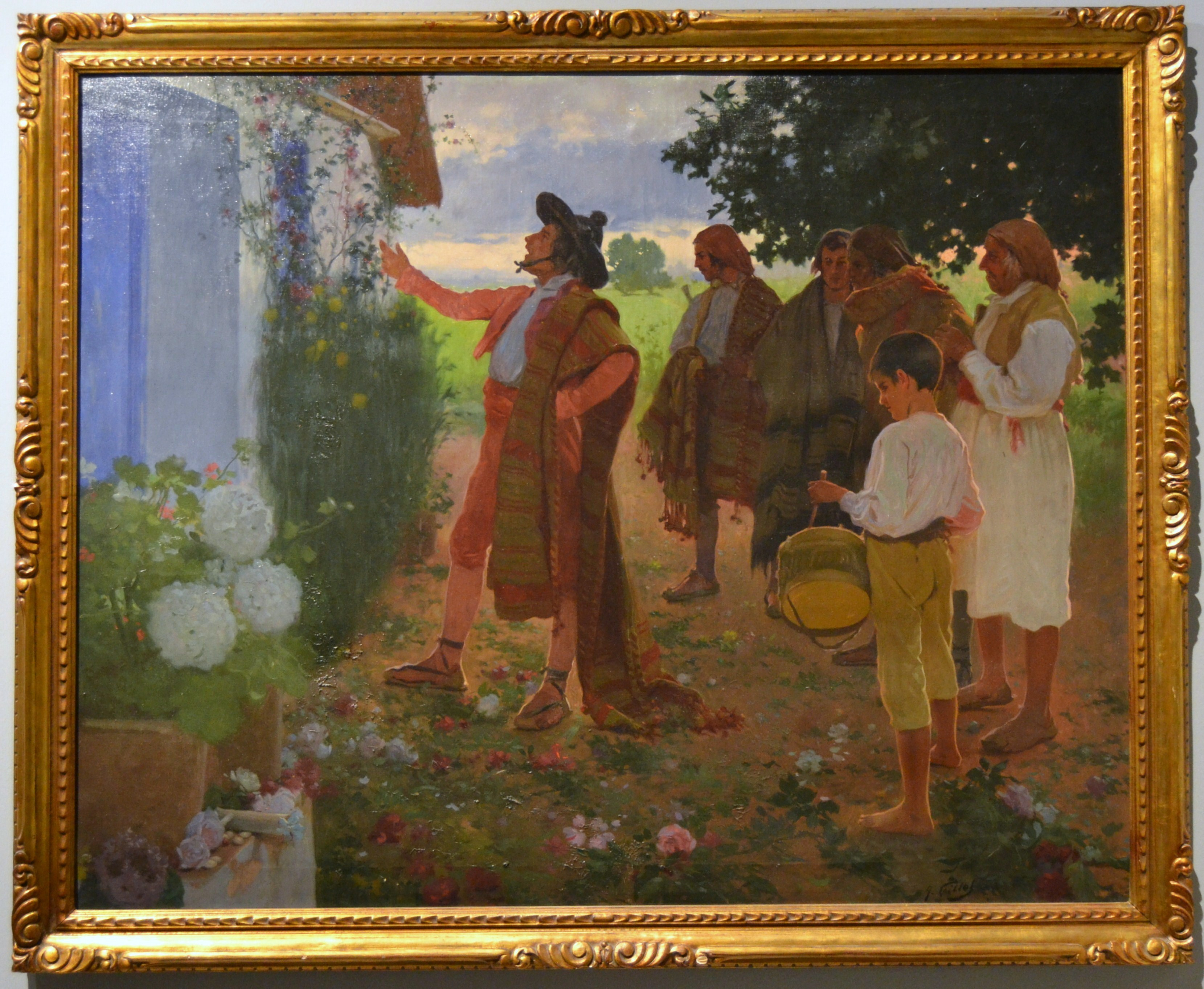 Les albaes, Antoni Fillol Granell, col·lecció particular, oli sobre tela.